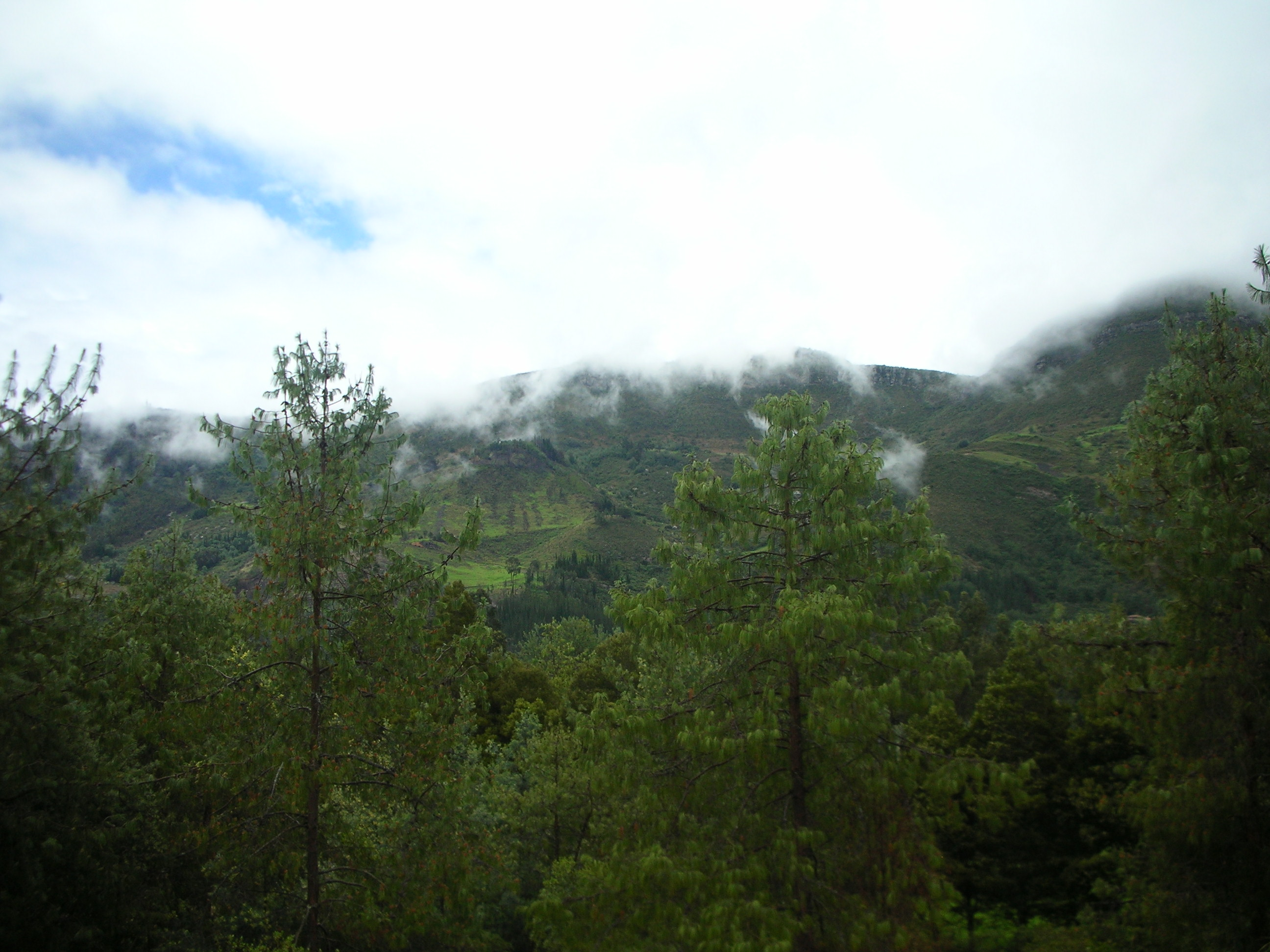 Esta fotografía fue tomada en el municipio colombiano con código 25843.